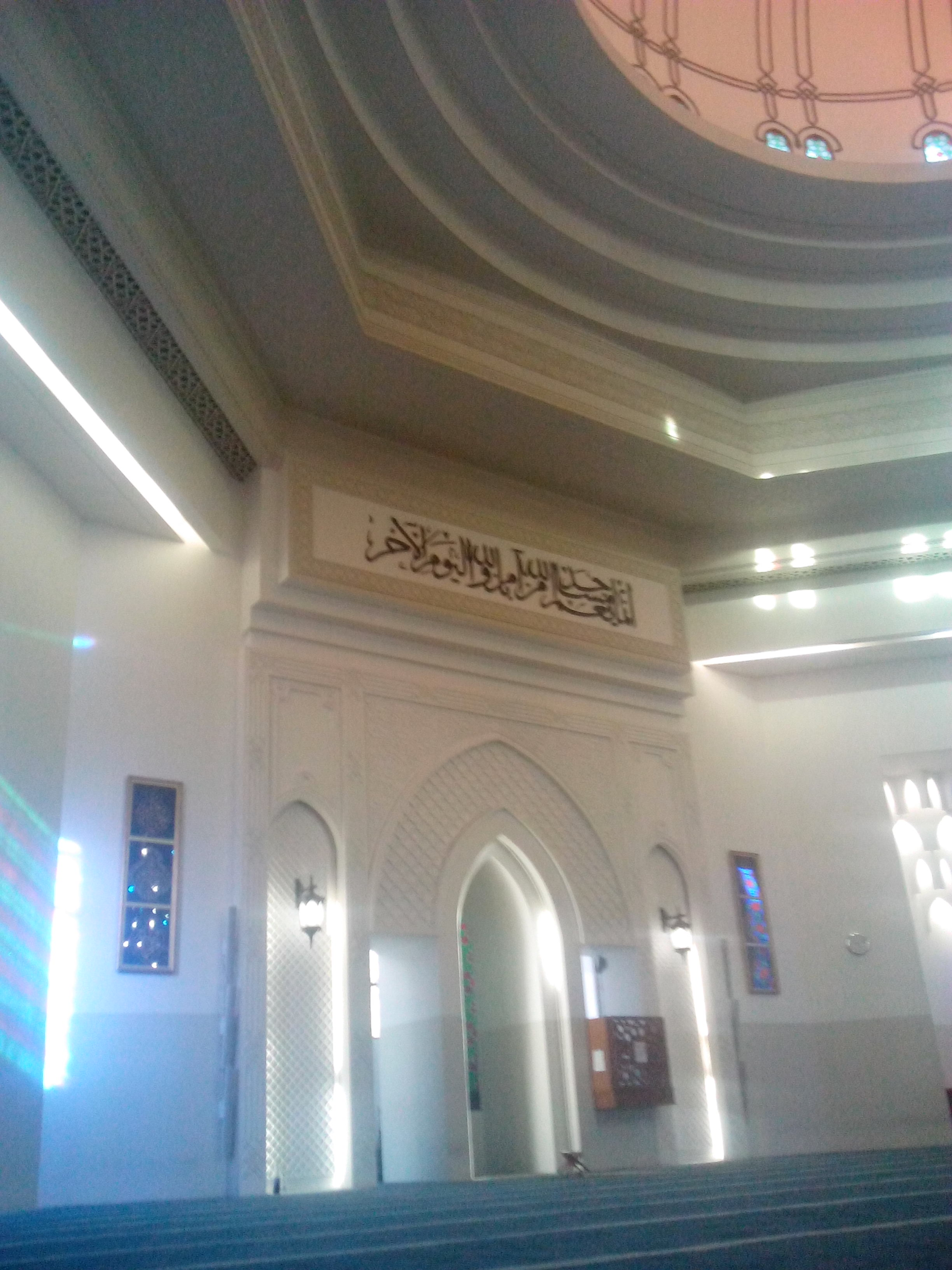 Vista interna Mezquita de Caracas